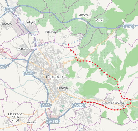 Ronda Este de Granada (en proyecto). Trazado previsto según el Estudio Informativo de 2009.